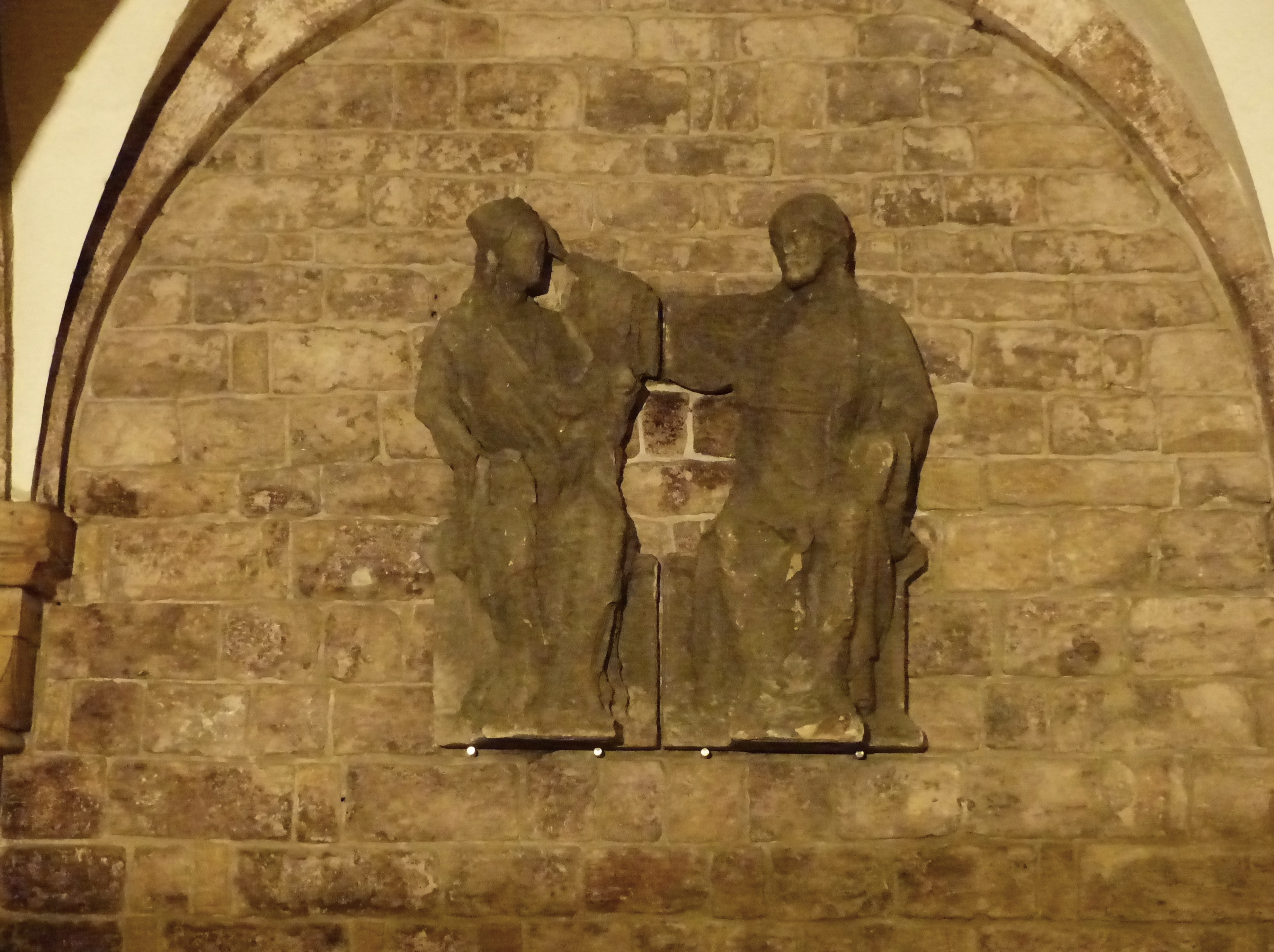 Krönung Mariens, Torso des Reliefs aus dem obersten Feld des Westgiebels, heute in der Ostkrypta (Raum der Stille)